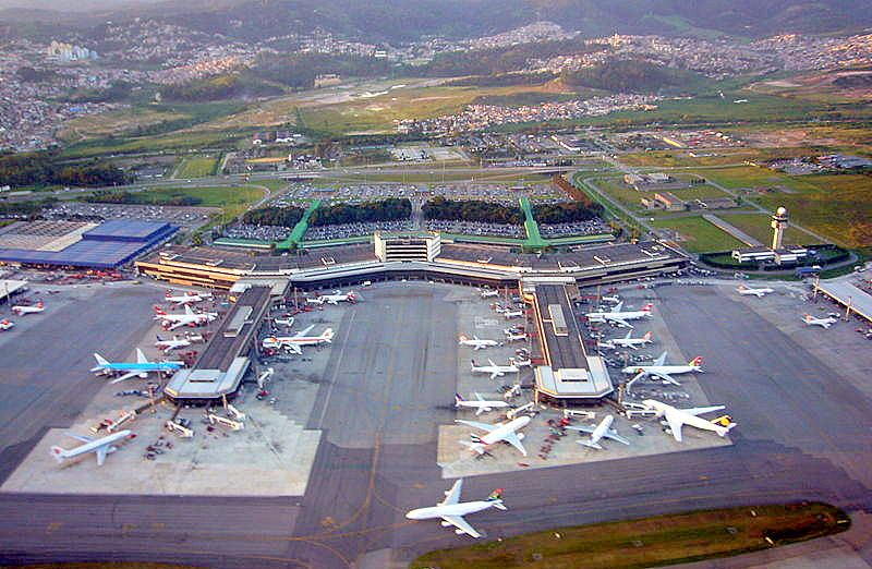 Imagem aérea do Aeroporto Internacional de Guarulhos